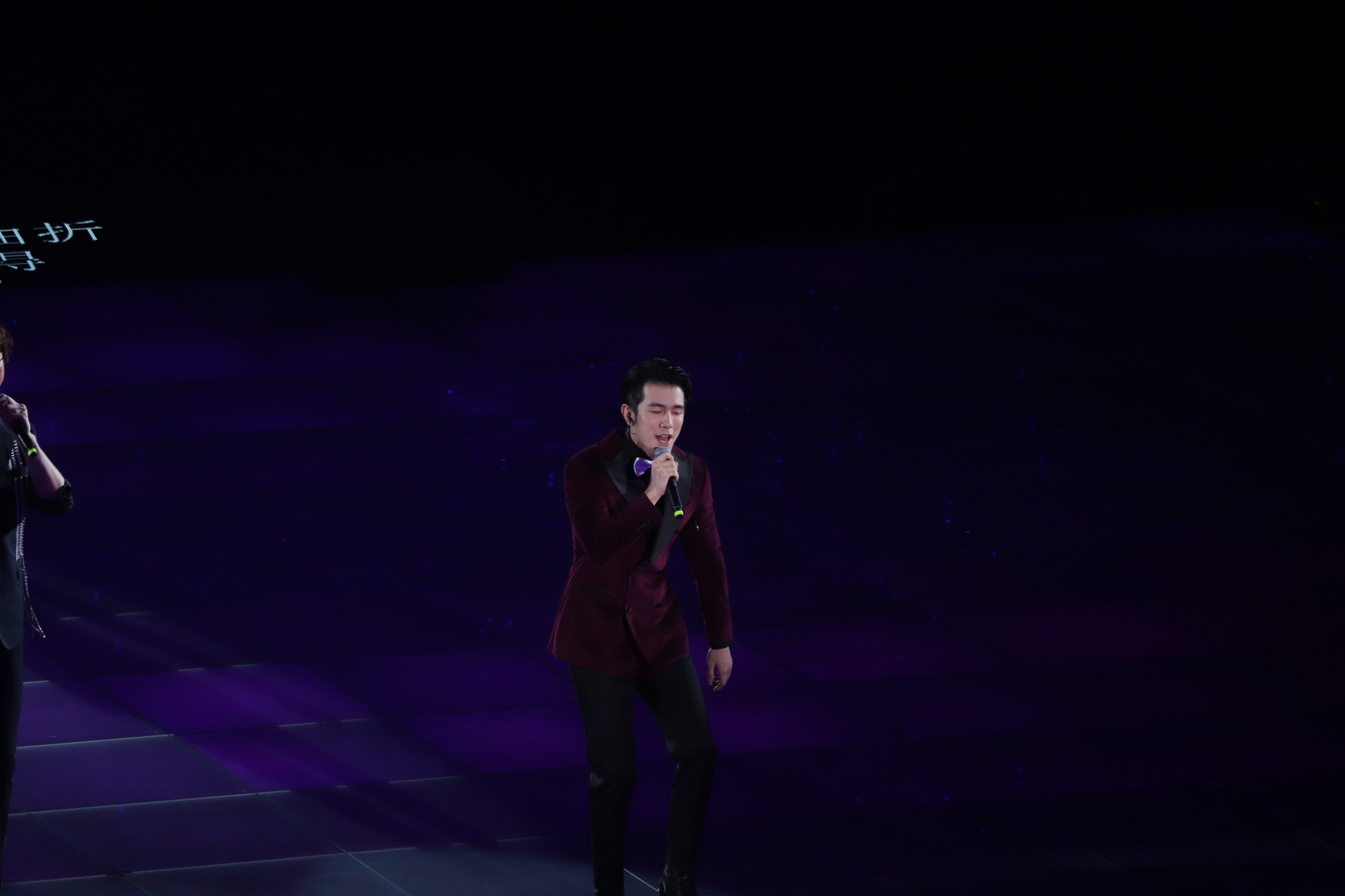 中文（中国大陆）: 龚子棋在“不说再见”系列演唱会上